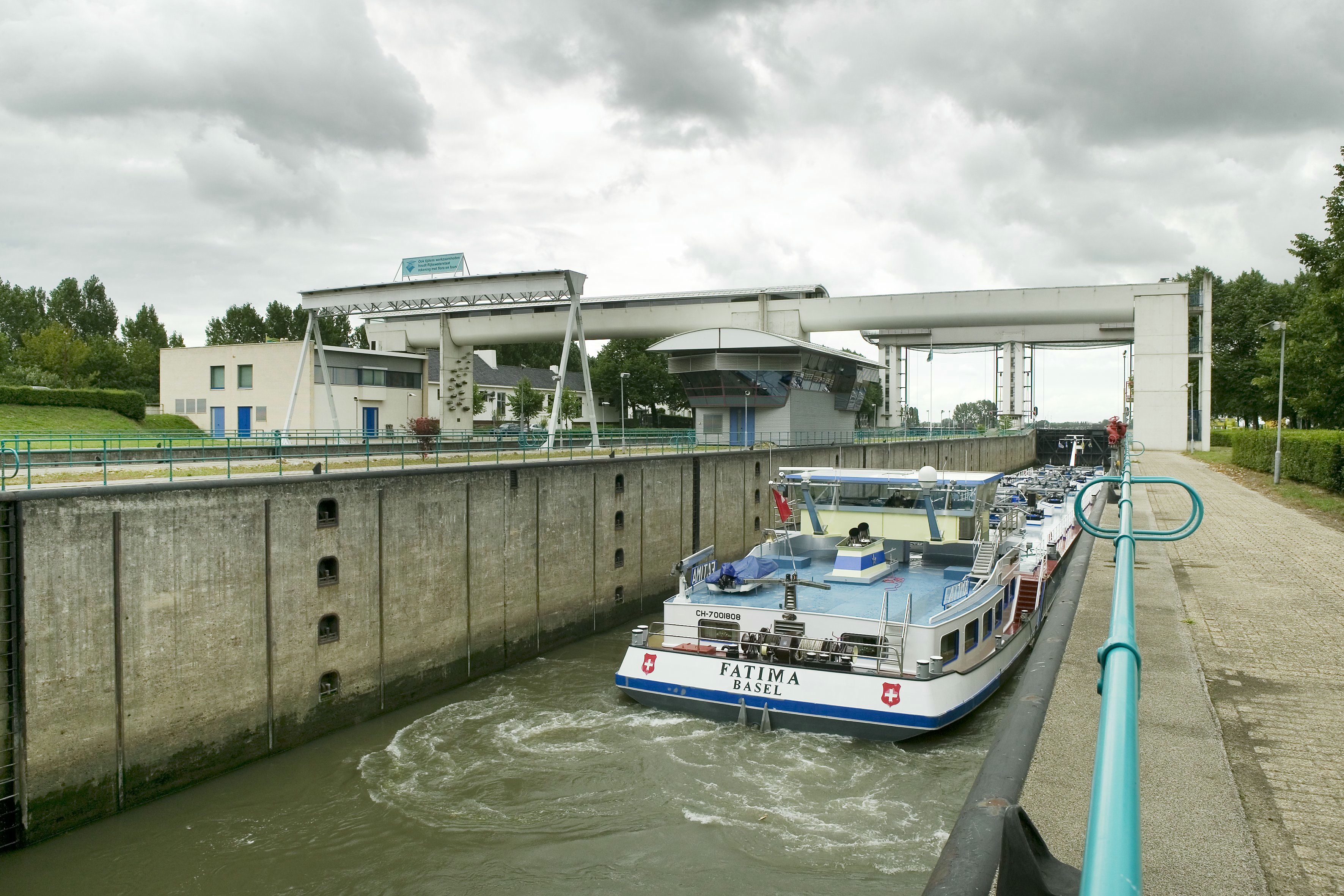 Beatrixsluizen: Overzicht sluizen